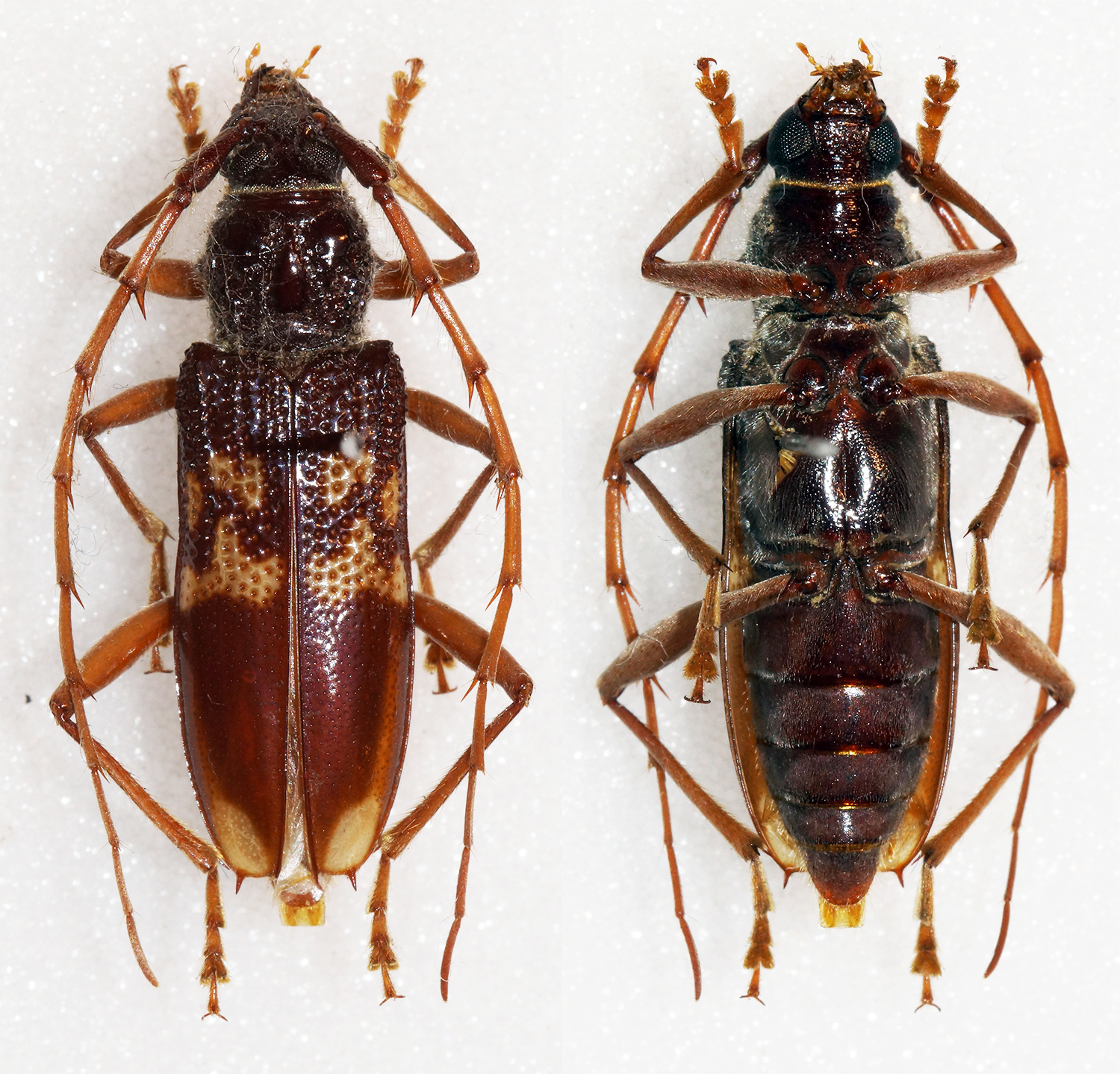 Fabricius,1775 Sex: Female Data: 10-01-92 - La Degollada - Gomera - Canary Islands Size: 19mm